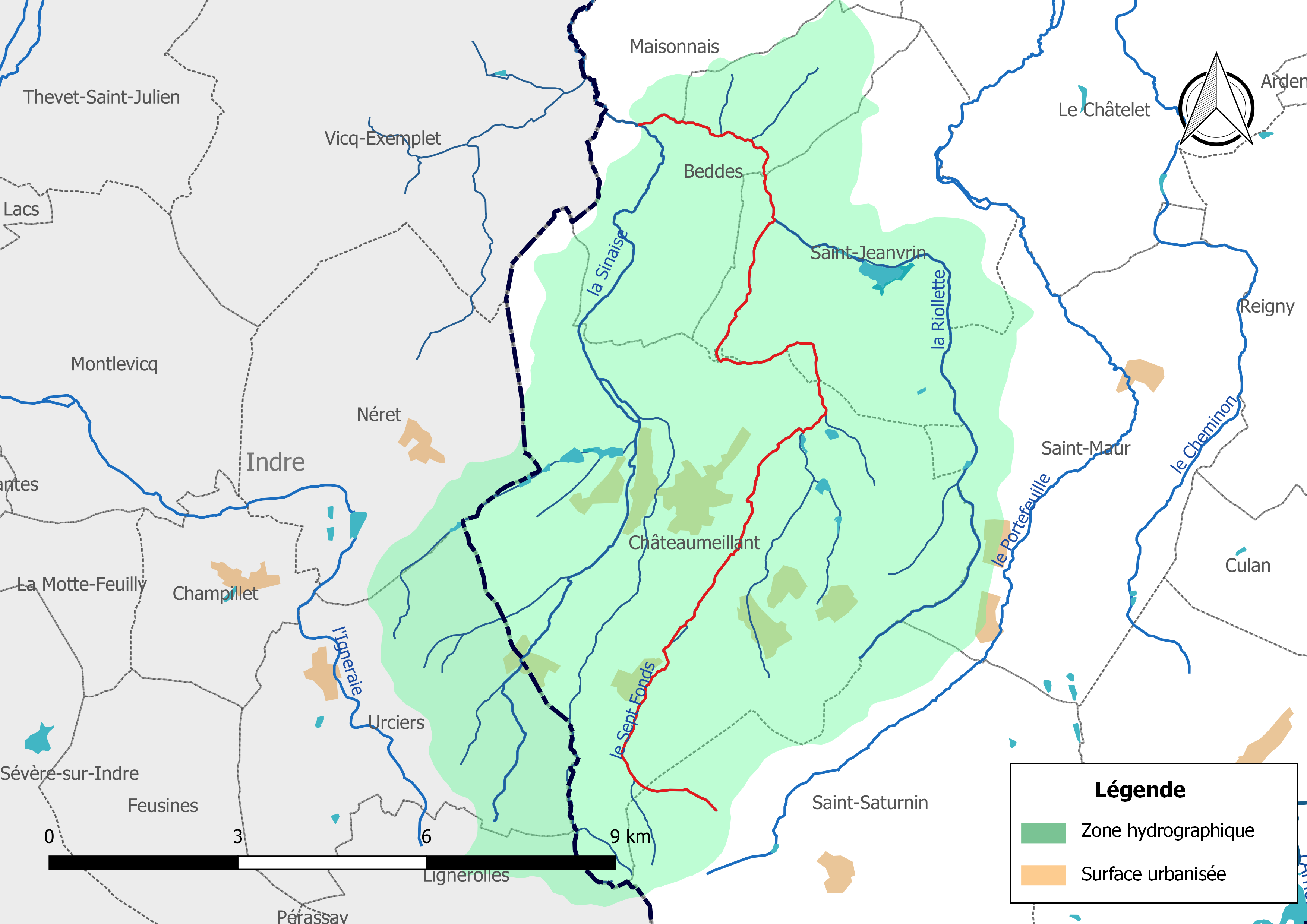 Carte du cours d'eau « le Sept Fonds » (France) et de la zone hydrographique dans laquelle il s'insère.